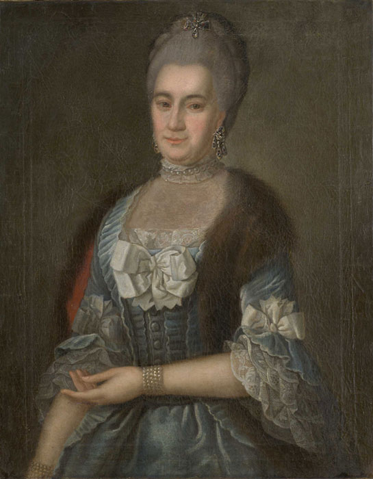 Helena von Bock née von Schulze (1722-1783)